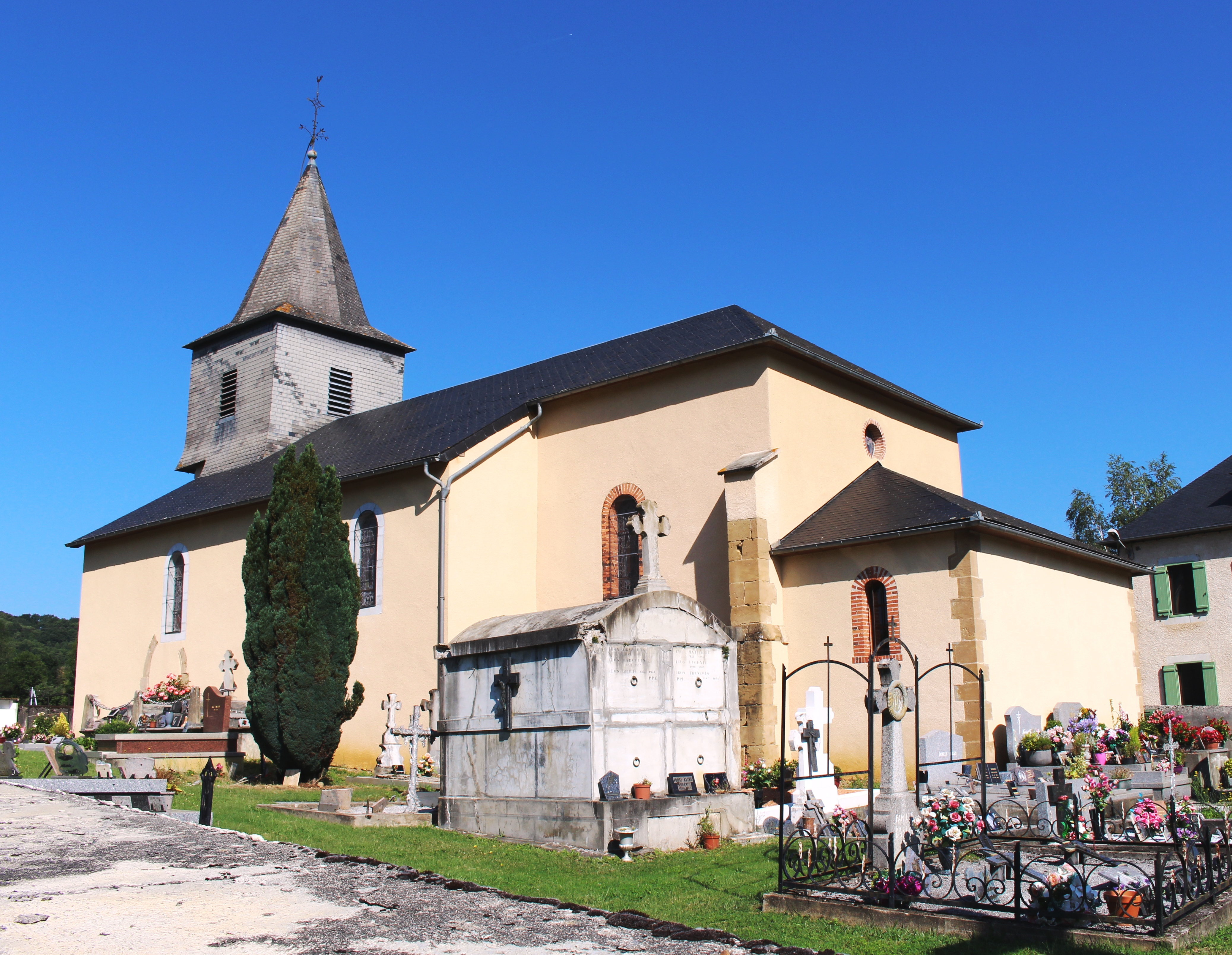 Église Saint-Martin de Galez (Hautes-Pyrénées)